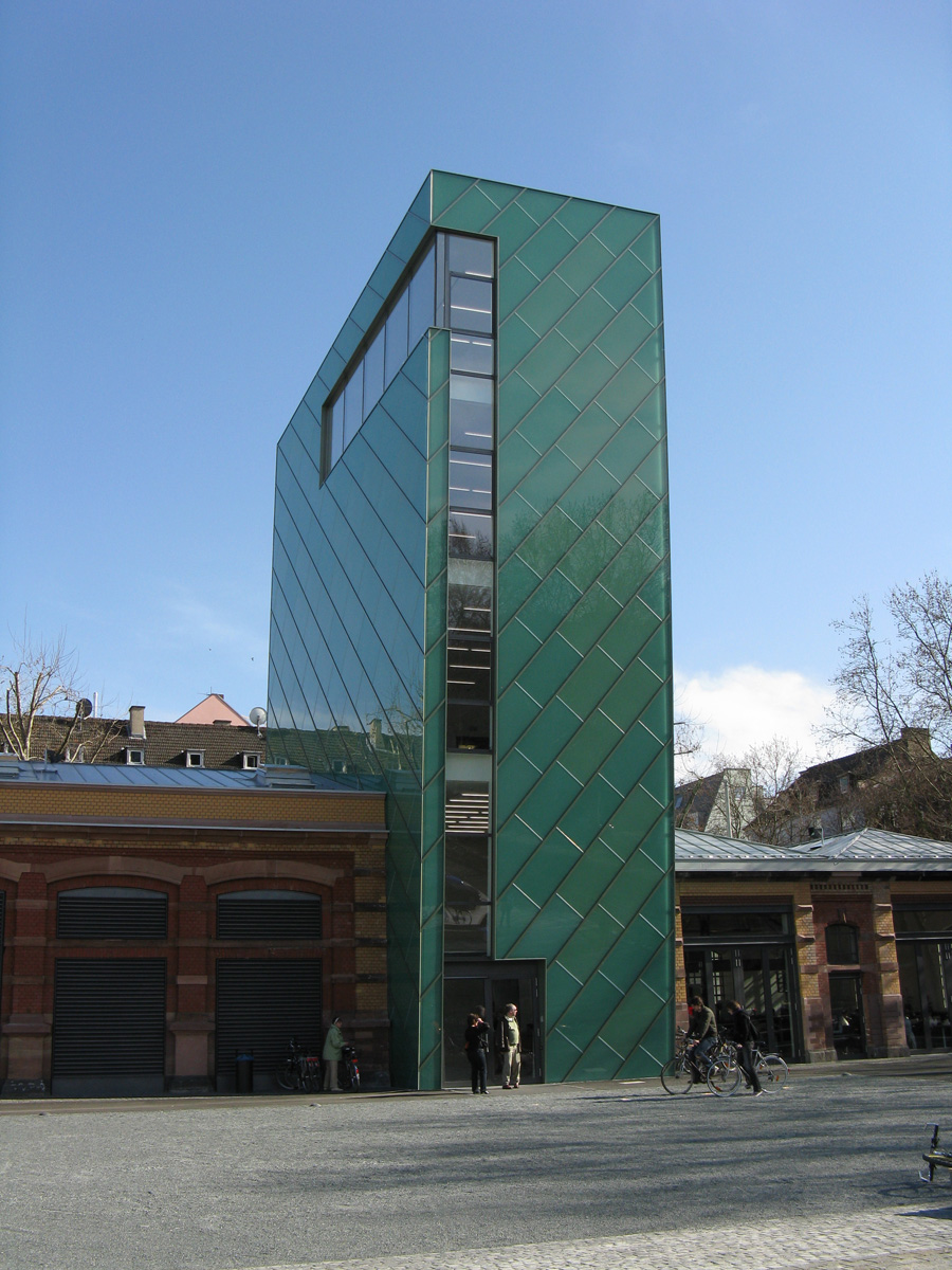 Kunsthalle der Stadt Mainz am Zollhafen. 2006 Umbau des 1887 von Eduard Kreyßig geplanten Kessel- und Maschinenhauses.